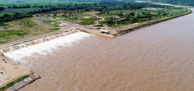 24 పంపుల ద్వార గోదావరి నీటిని కృష్ణ లోకి ఎత్తి పోస్తున్న పట్టిసీమ